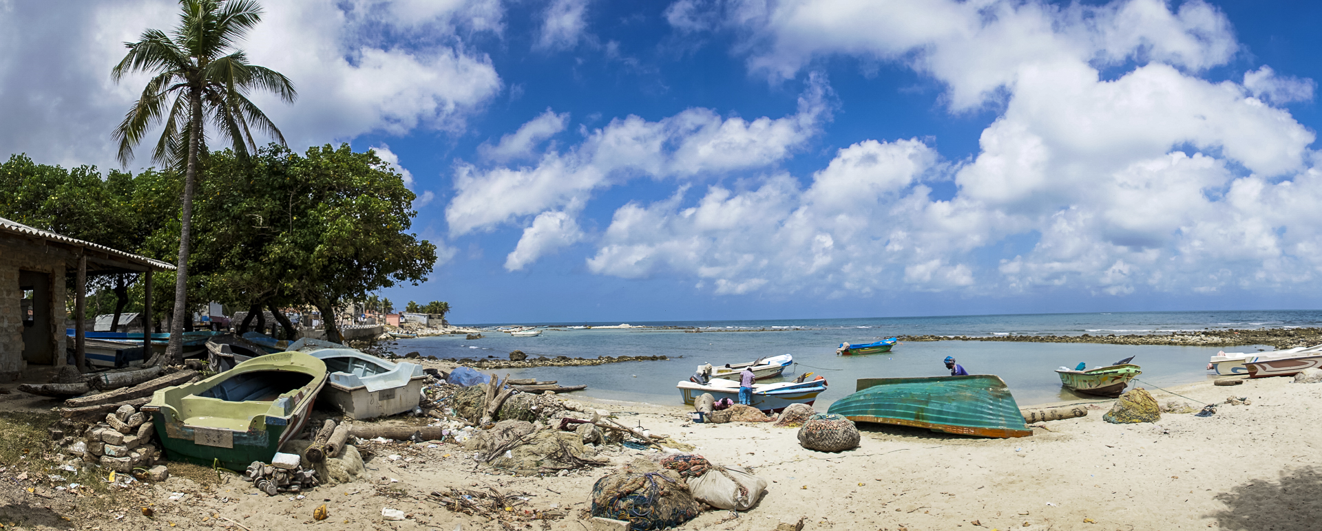 die Nordspitze von Sri Lanka